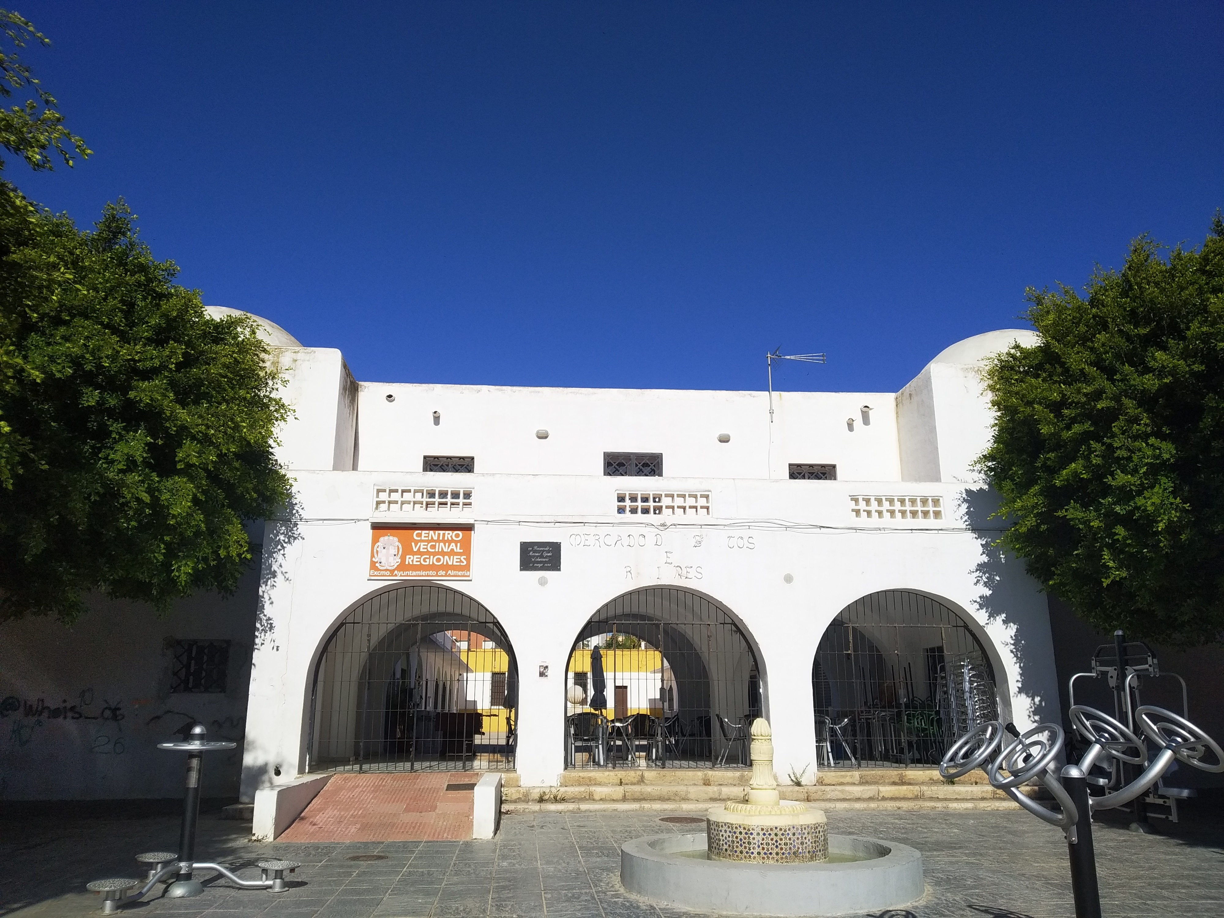 Mercado de Abastos del barrio de Regiones, construido en 1942. Actualmente no se utiliza como mercado, sino como un vivero de asociaciones.